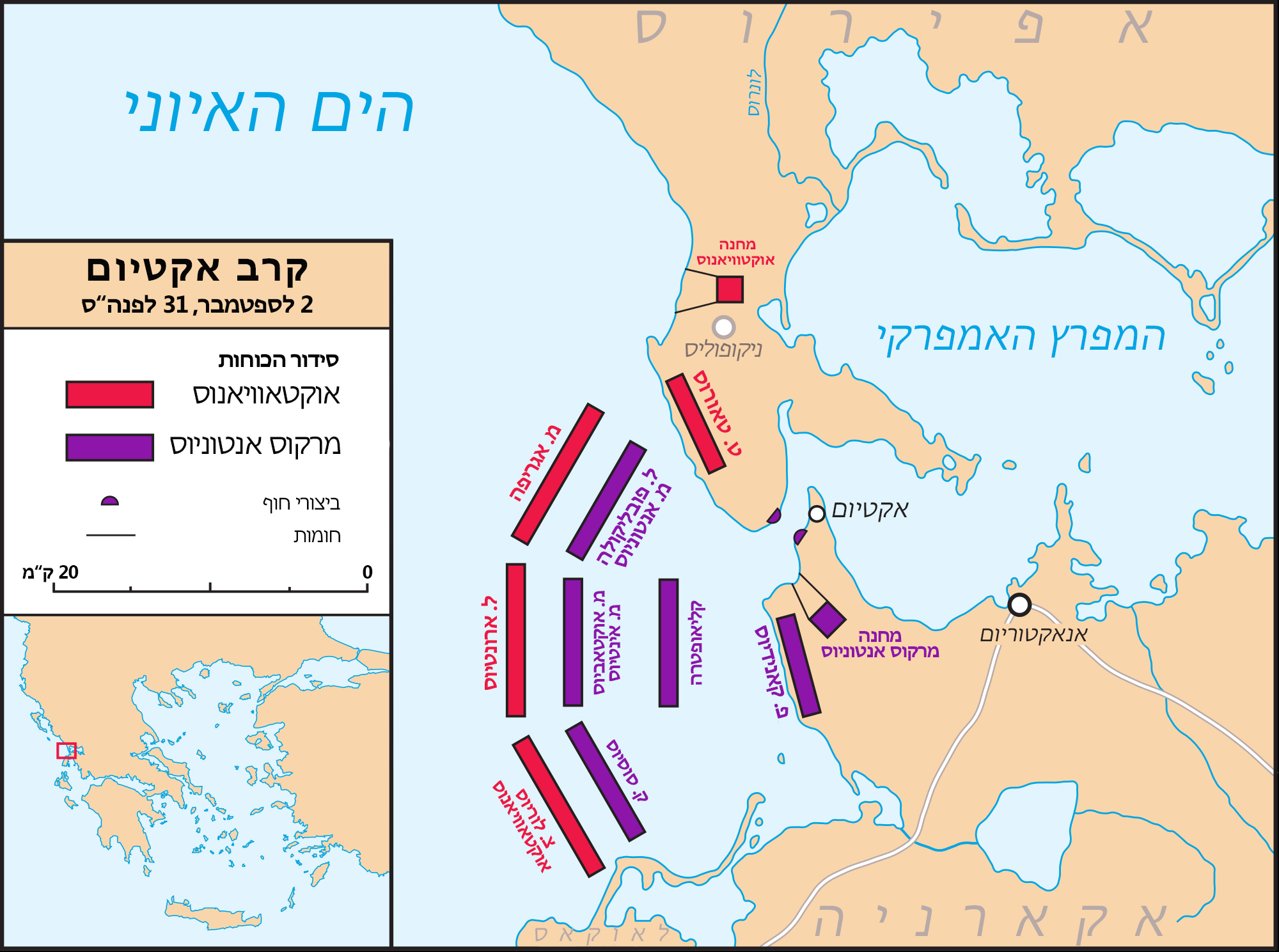 מפת היערכות הציים לקראת קרב אקטיום